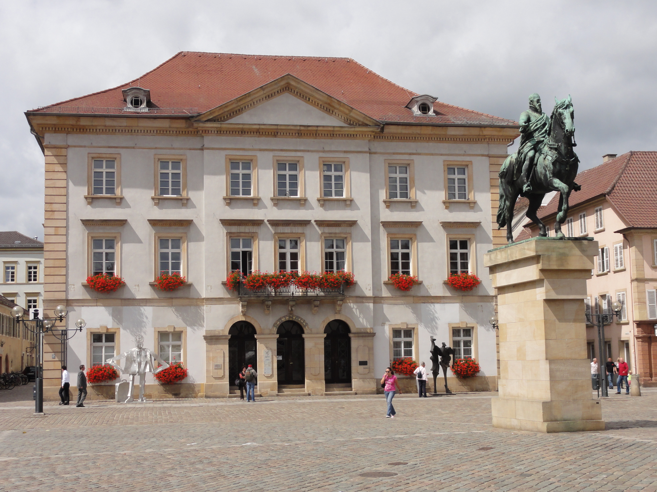 Rheinland-Pfalz, Landau in der Pfalz, Rathaus